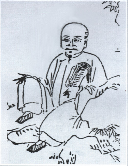 屠绅（1744年－1801年），字闲书、笏言，号磊砢山人、黍余裔孙、竹勿山石道人，江苏江阴人。